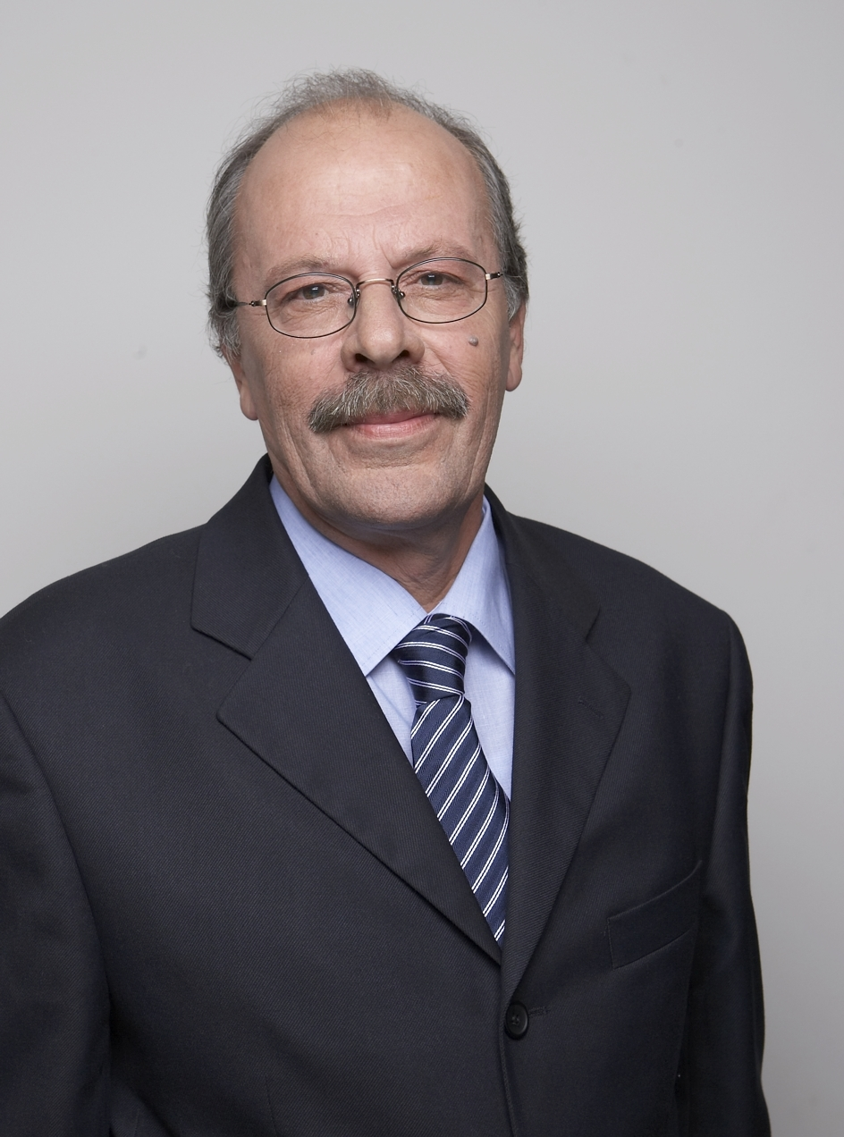 Ευρωεκλογές 2009